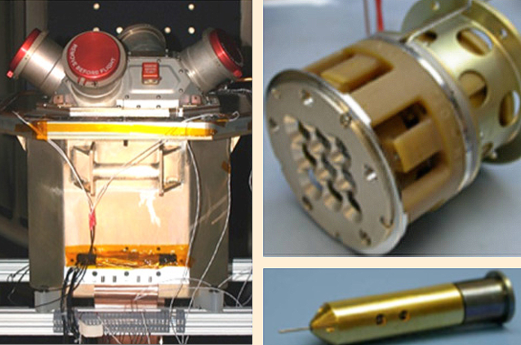 Grappes de moteurs à micro-propulsion colloïdales chargés de compenser les forces s’exerçant sur le satellite LISA Pathfinder. Font partie du DRS (Disturbance Reduction System) fournis par la NASA.